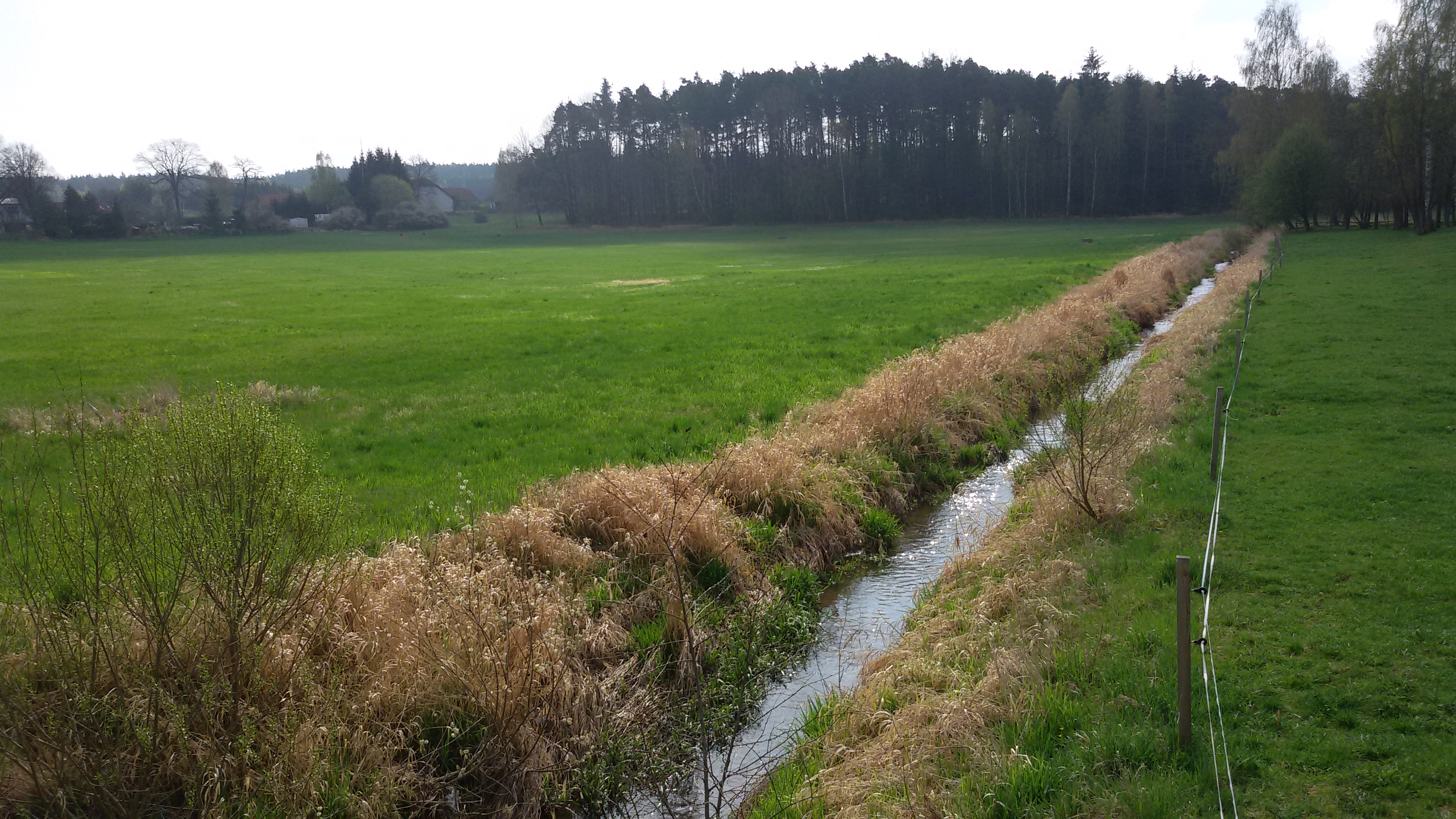 Miletínský potok odděluje Horní a Dolní Miletín v okrese České Budějovice. Pohled proti proudu.